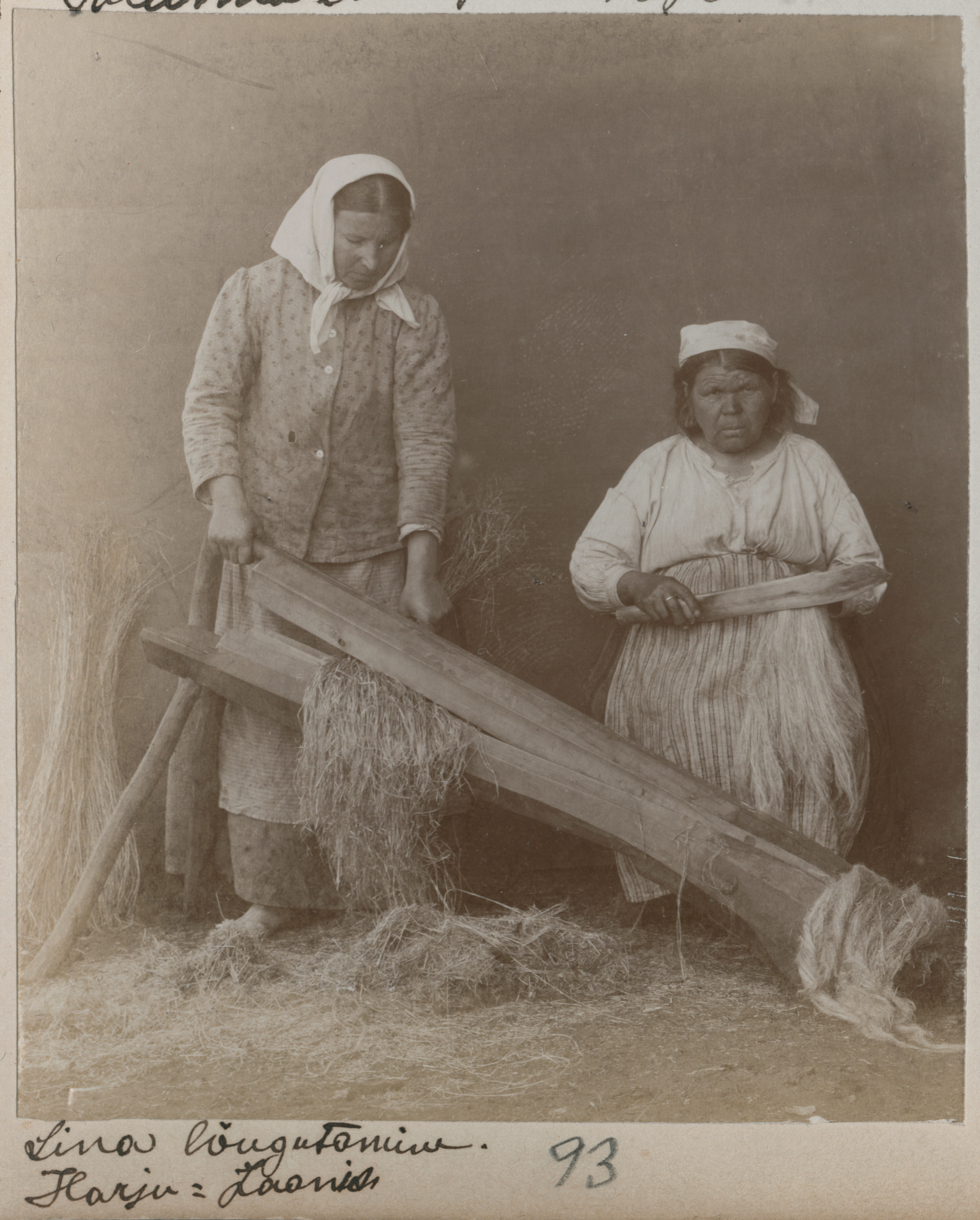 Lina lõugutamine Harju-Jaanis